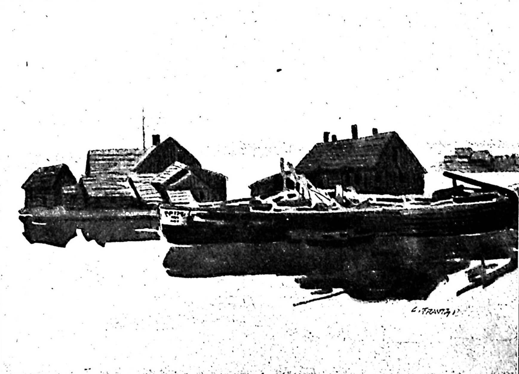 Беларуская (тарашкевіца): Рака Бярэзіна (Biarezina)